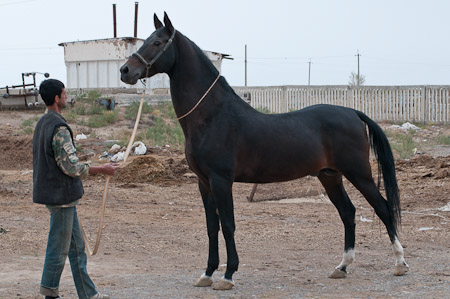 Studfarm in Turkmenistan